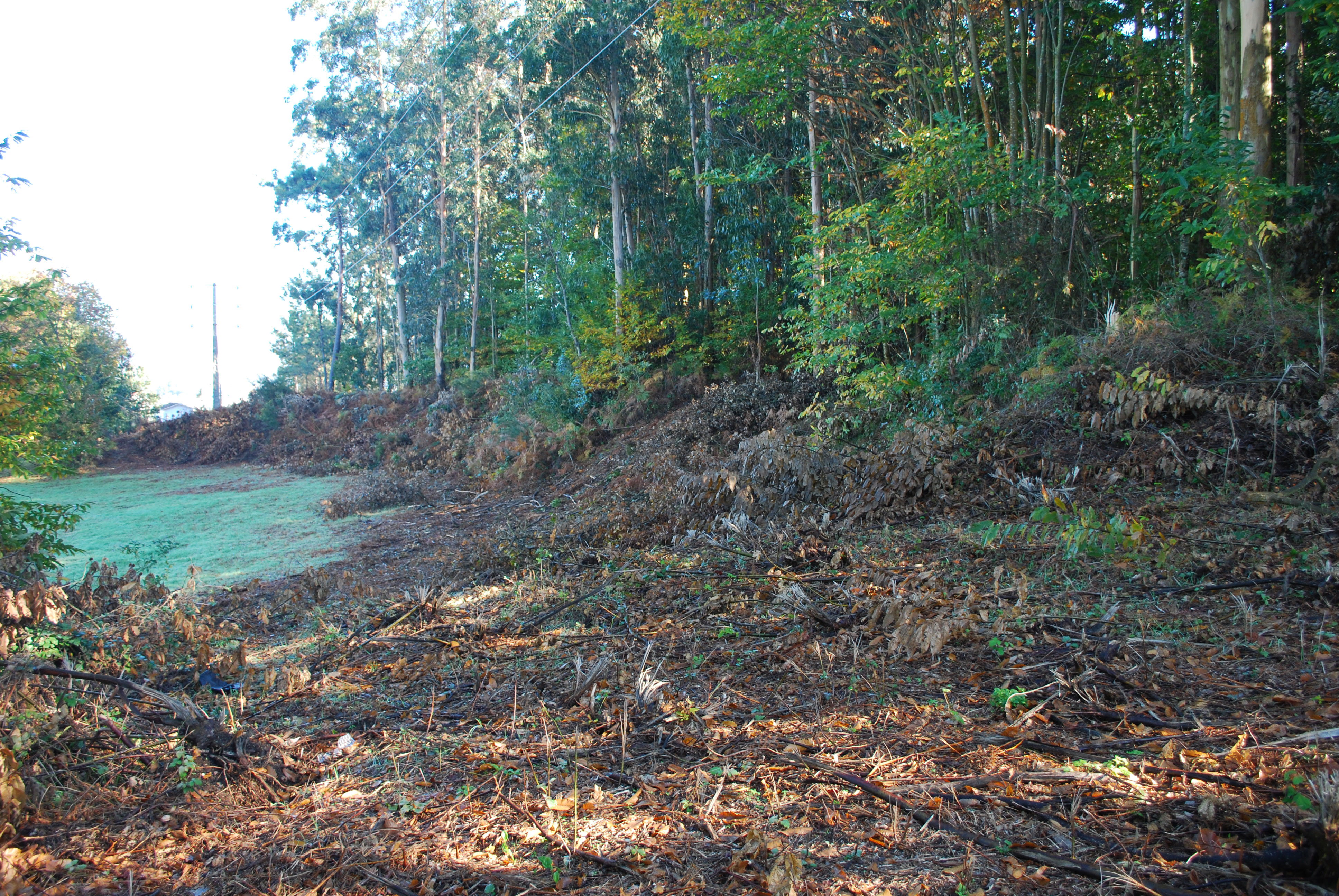 Vista da Croa do castro do petouzal desbrozada para un liña eléctrica que pasa sobre ela